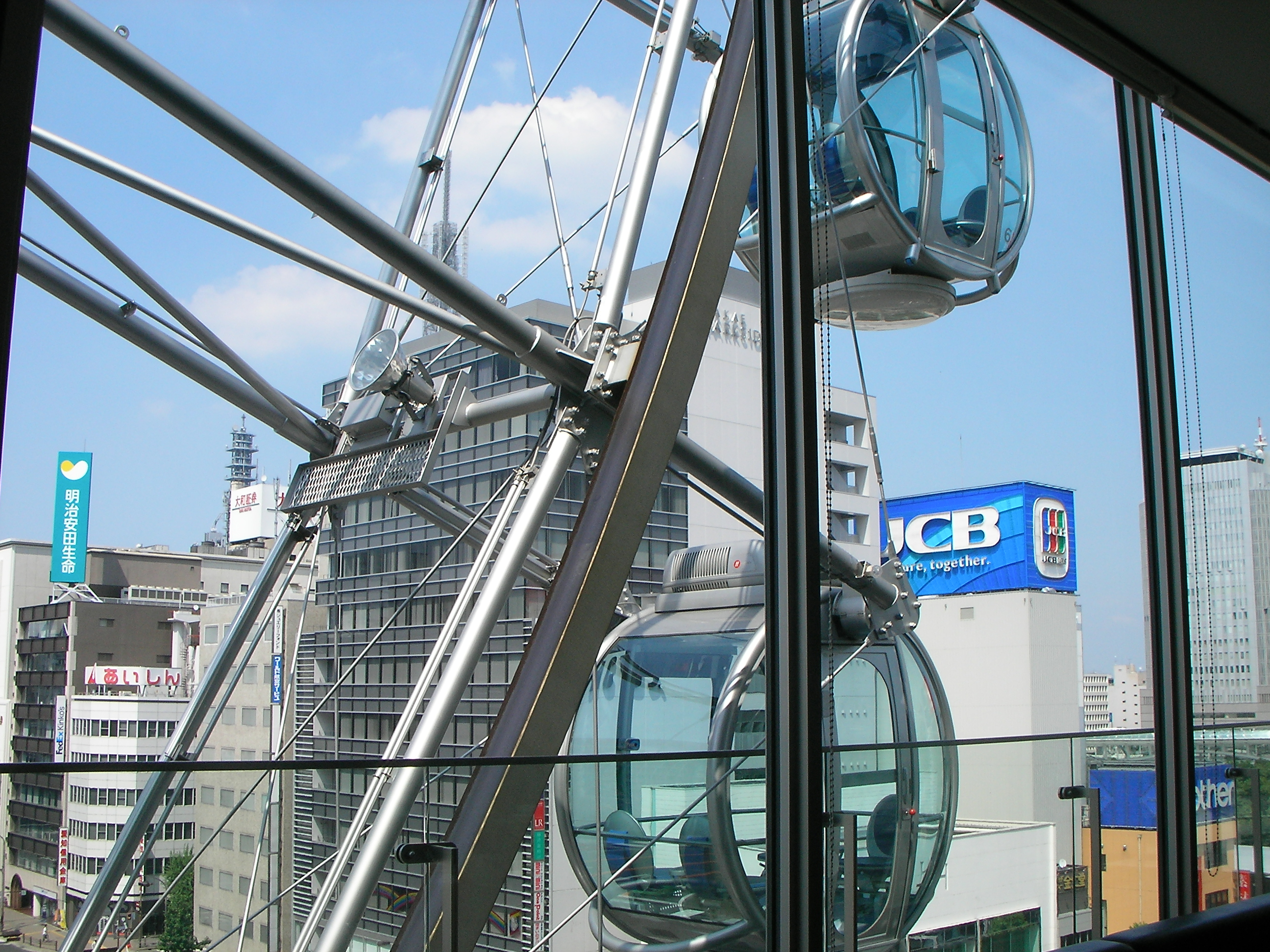 サンシャインビル。観覧車付きビル。飯食ってると覗かれる。外観を取るのを忘れた。 [地図を表示] サンシャインサカエ Sky-Boat